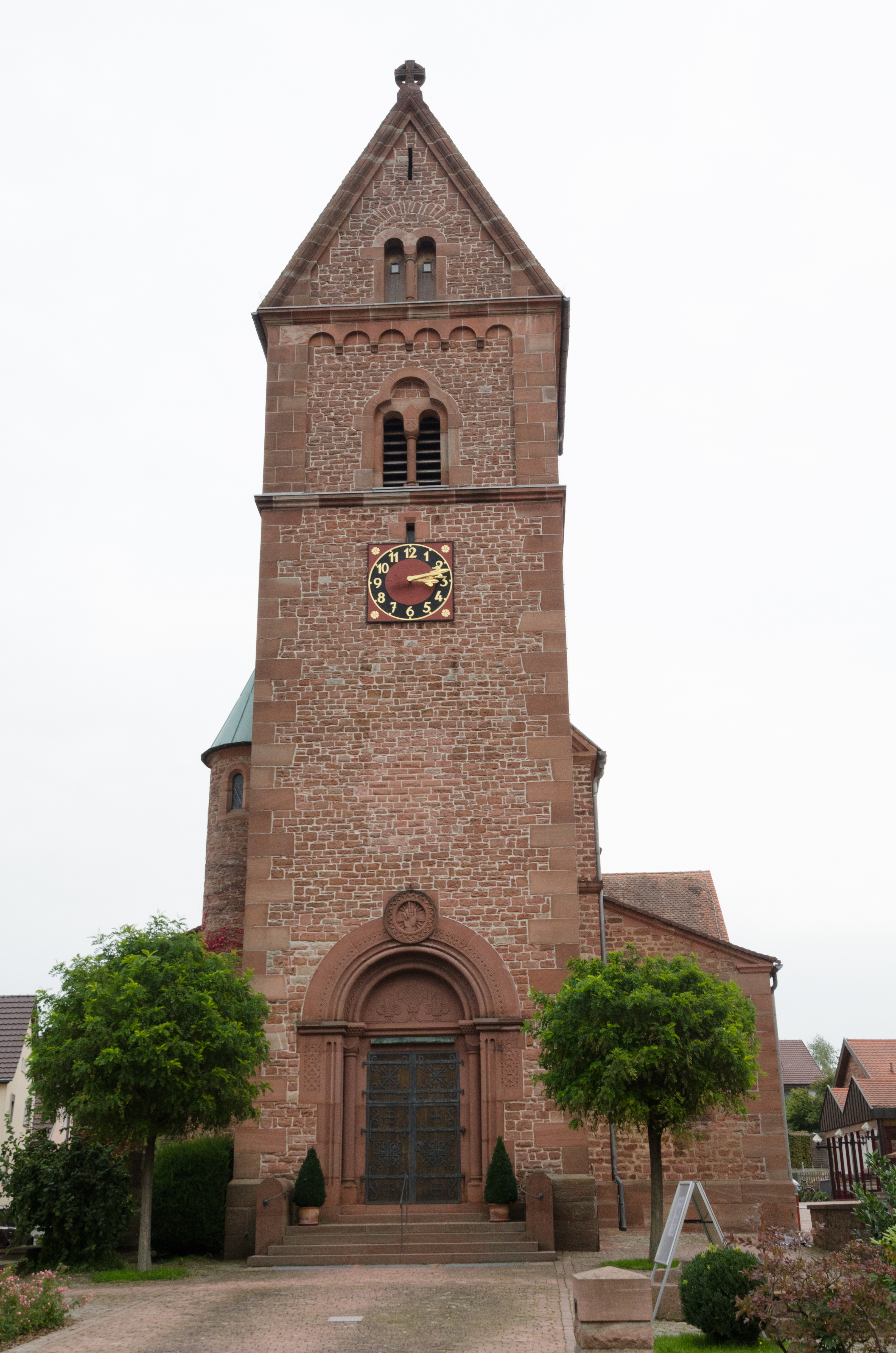 Dorfprozelten, St. Vitus